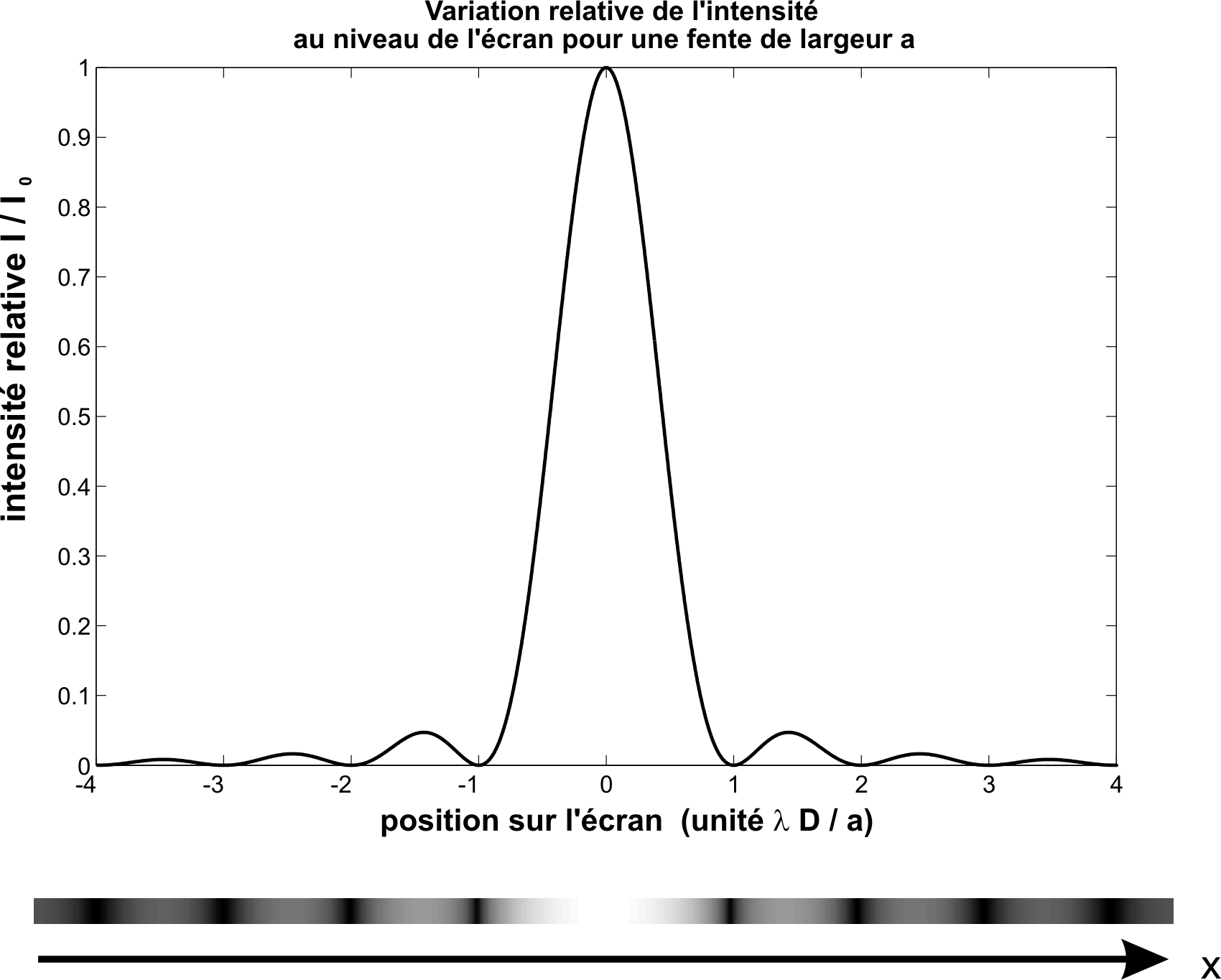 Diffraction de Fraunhoffer par une fente.